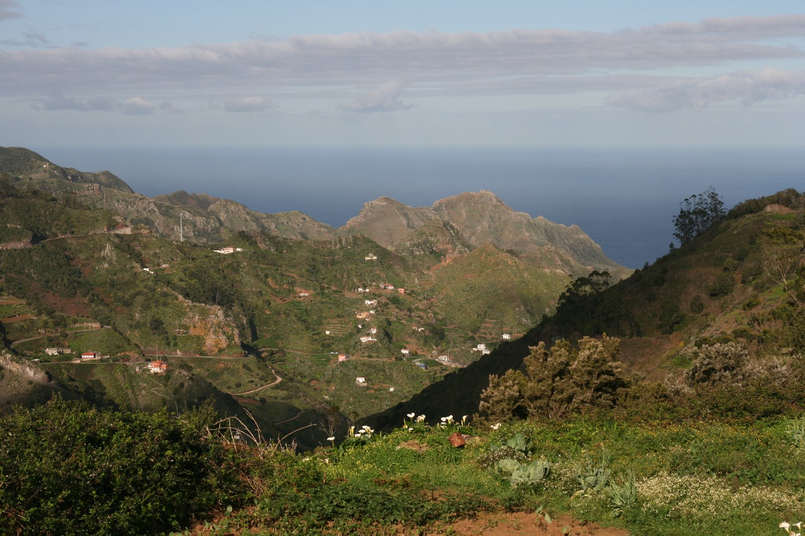 Vista de El Batán